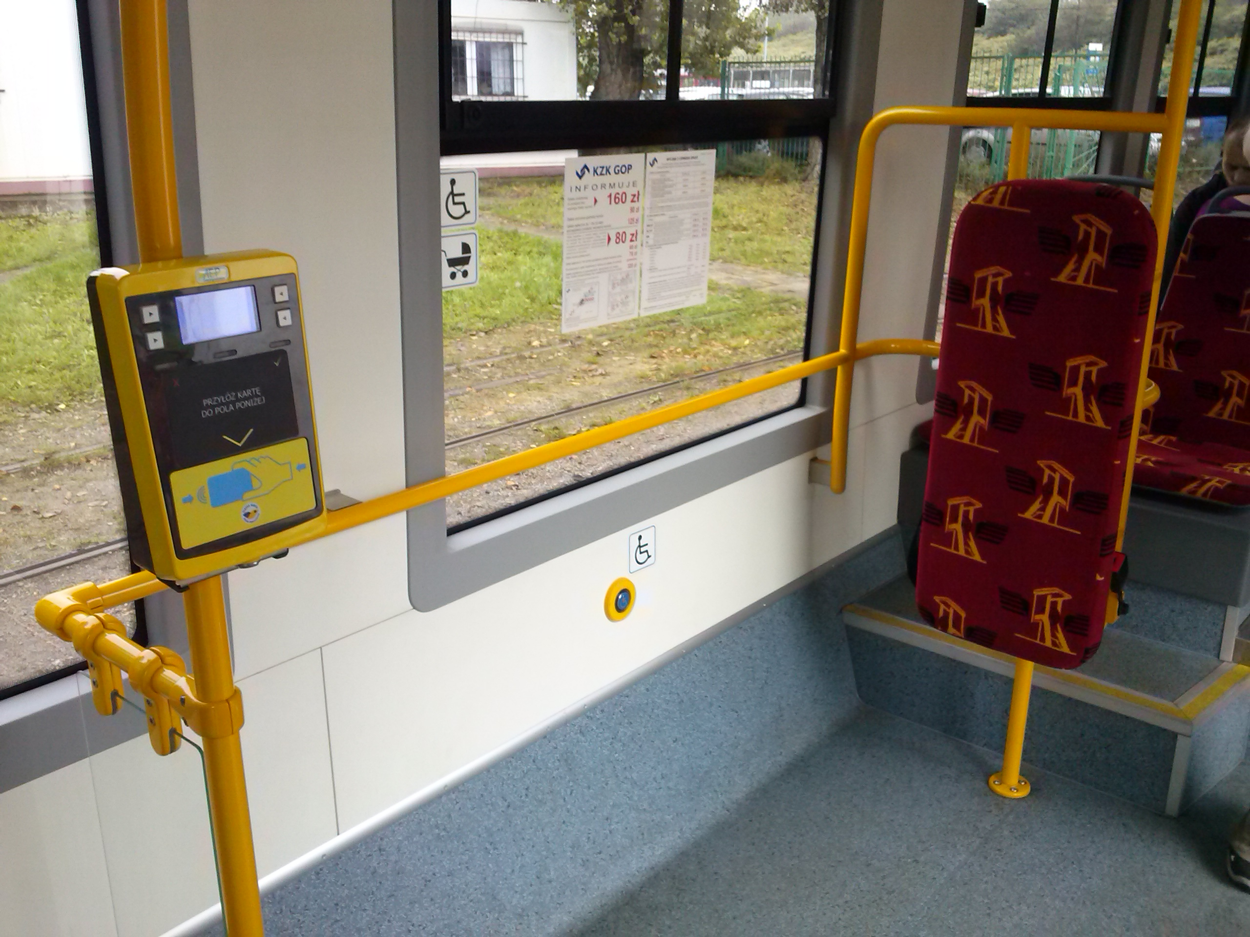 Pesa Twist 2012N - miejsce na wózki